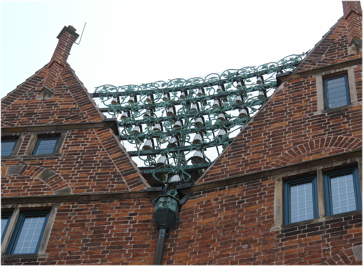 Böttcherstraße Bremen: Porzellan-Glocken am Haus des Glockenspiels Das abgebildete Objekt ist ein geschütztes Kulturdenkmal in der Freien Hansestadt Bremen, mit der Nr. 1500,T beim Landesamt für Denkmalpflege registriert.